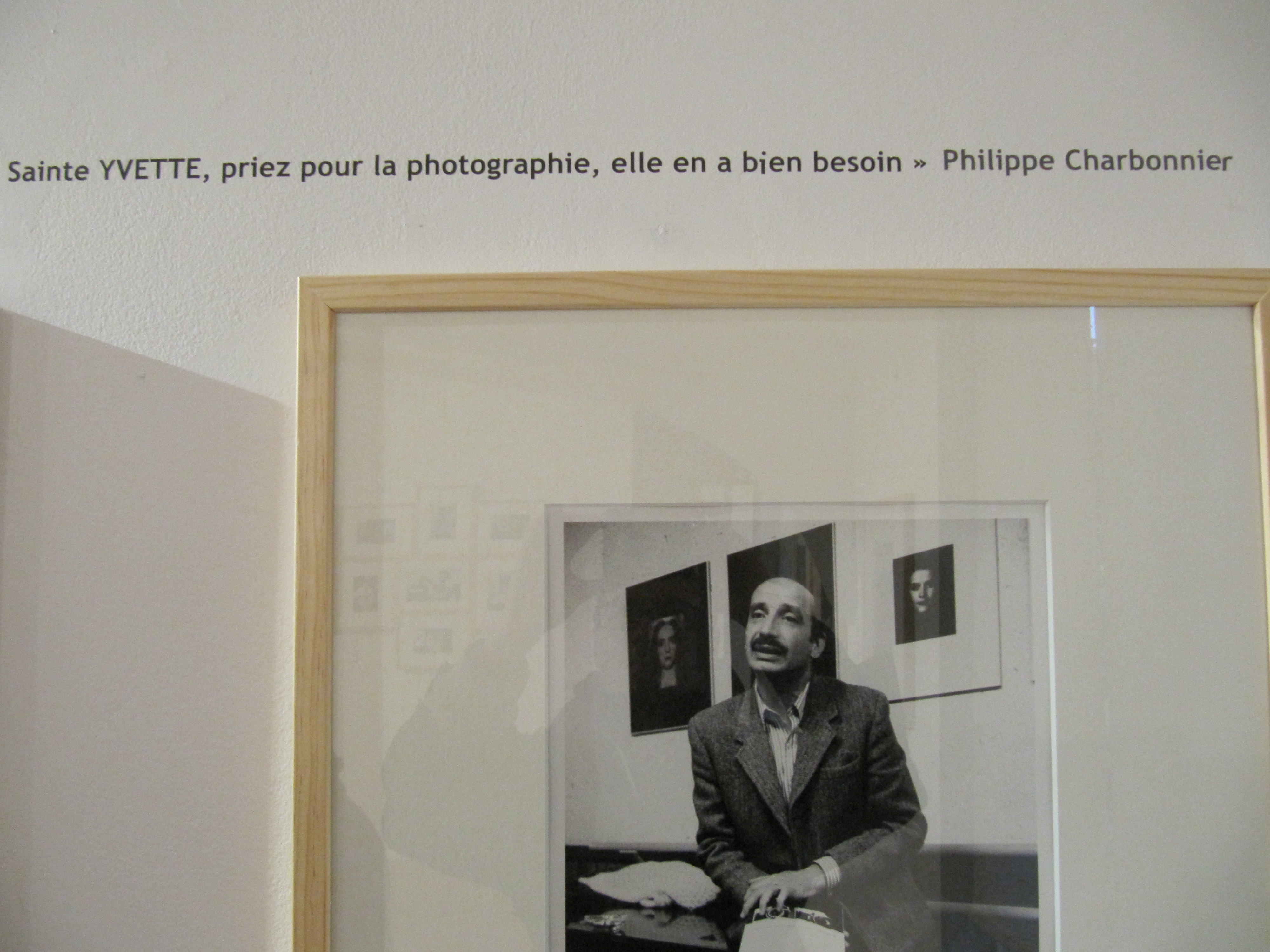 En novembre 2012, le musée du Montparnasse a présenté "Mademoiselle Yvette Troispoux, photographe", première exposition rétrospective présentant des photographies tirées de son album privé. avec Édouard Boubat, à Musée du Montparnasse.